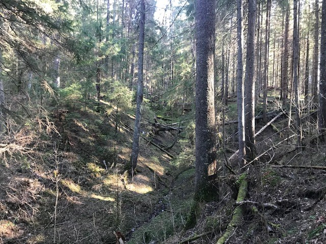 Ravinegranskog i Lågabakkane